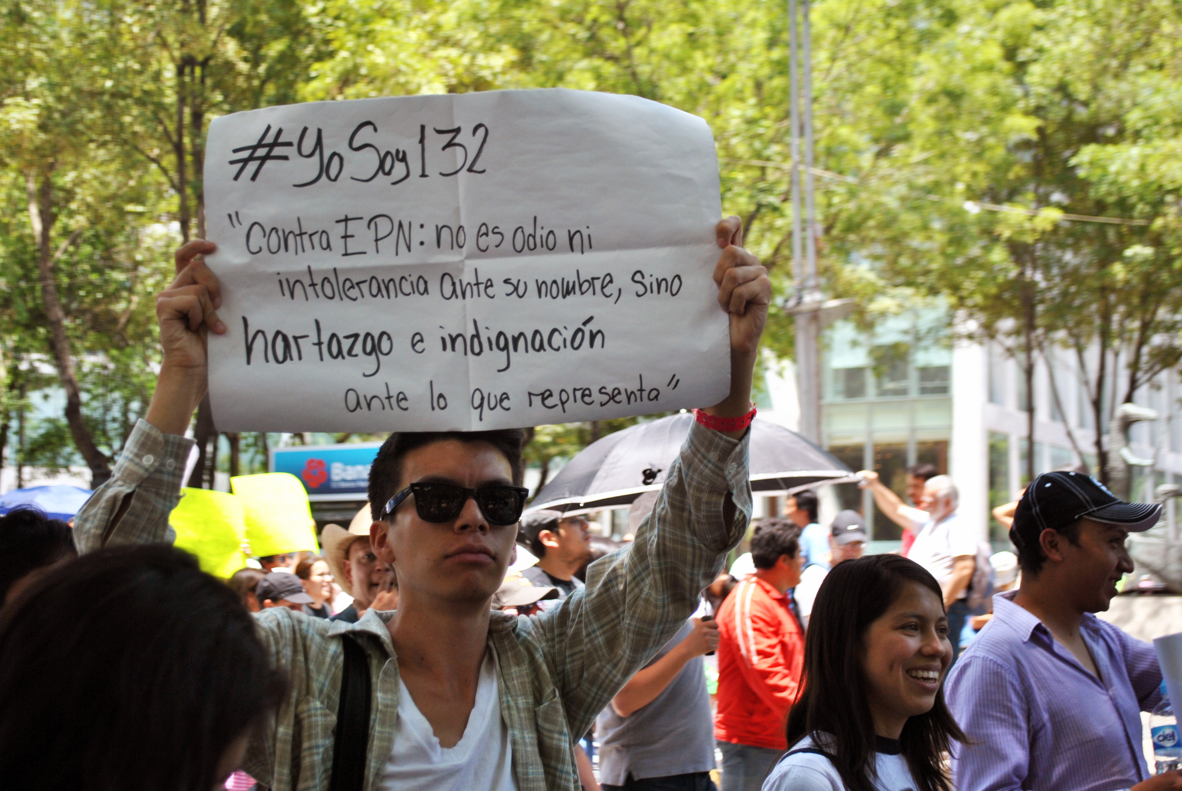 Manifestantes en la marcha #YoSoy132, Ciudad de México.